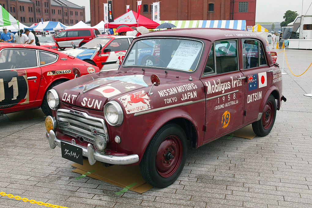 Datsun 1000 Fuji-Go (Datsun 210)